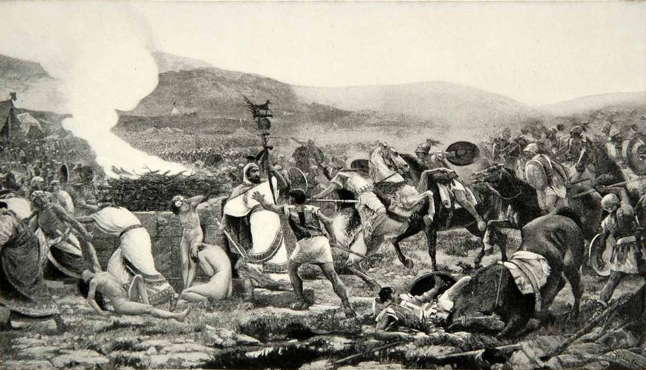 Copy of the Battle of Himera, wrongly named Battle of Arbela